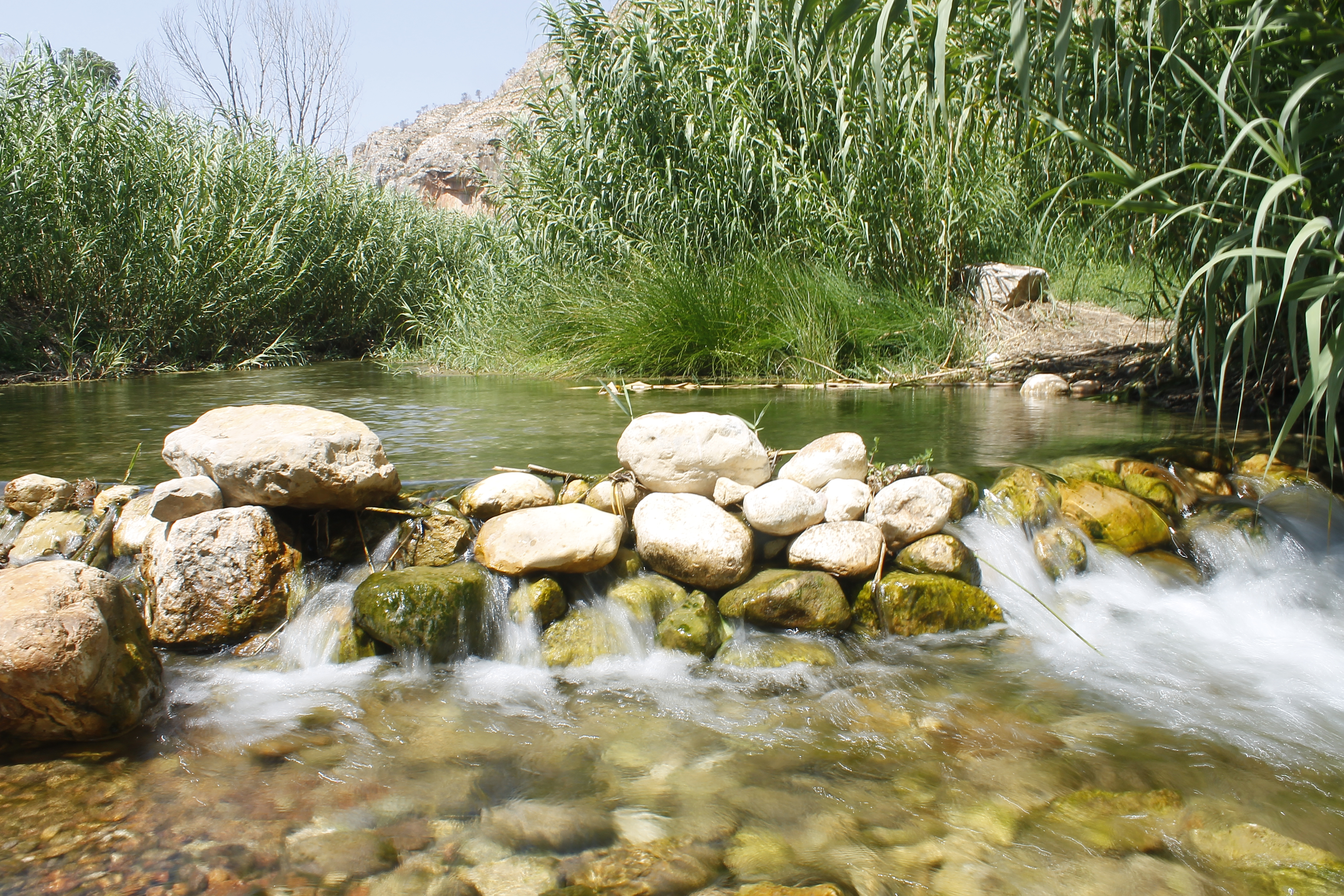 Gestalgar